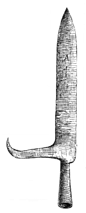 ilustracja